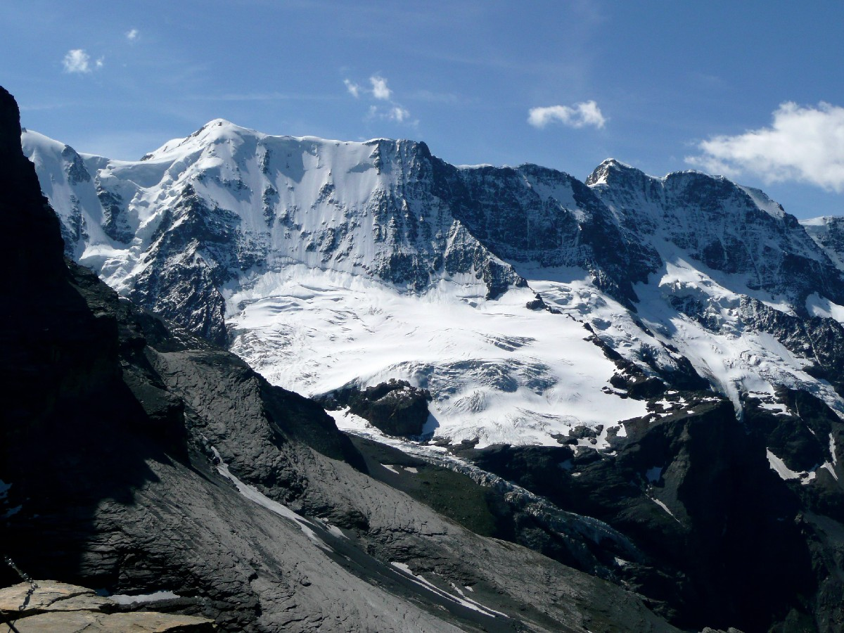 Ebnefluh (from Schwarzmönch)